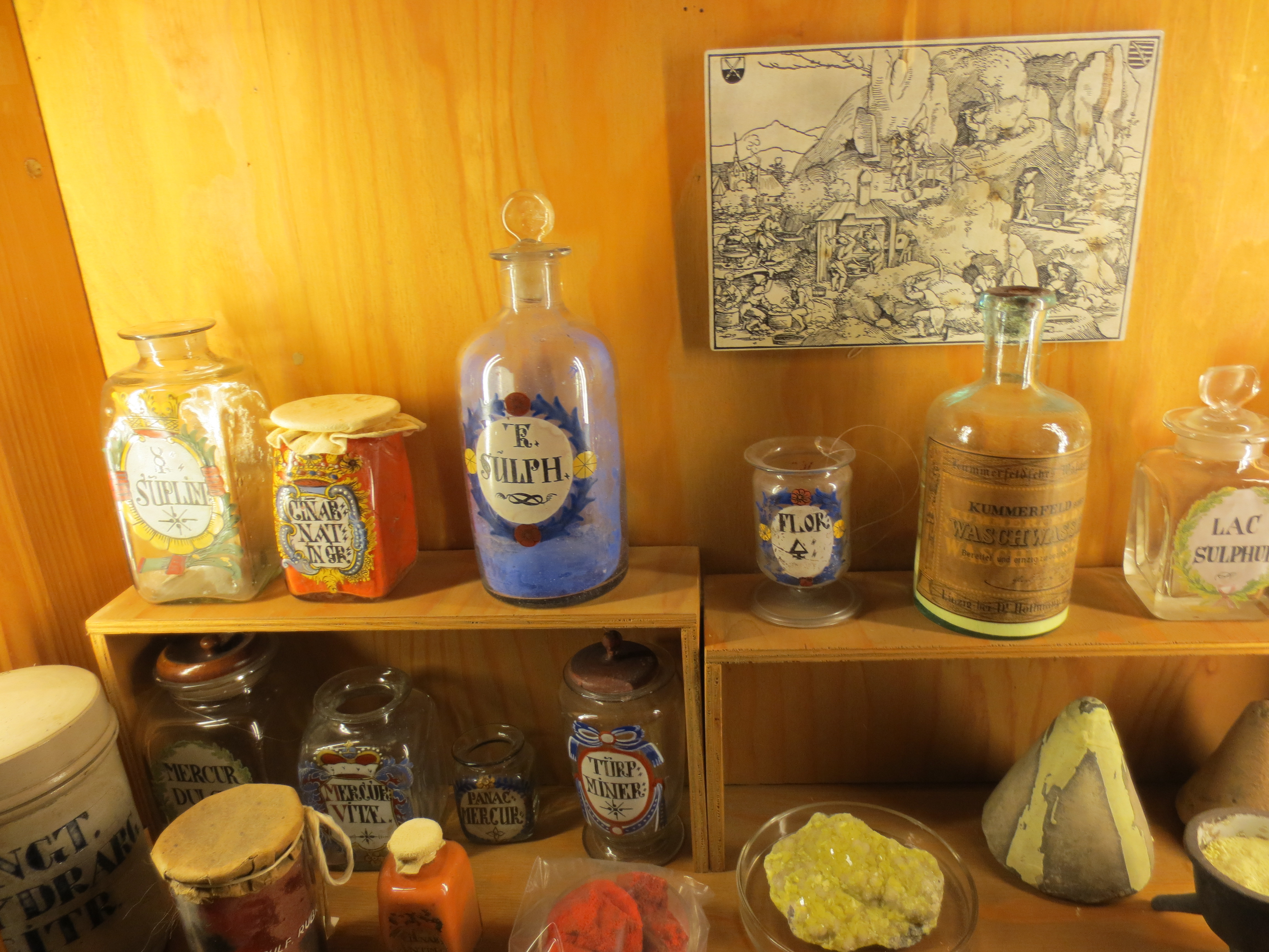 Vitrine mit mineralischen Substanzen für die Herstellung von Arzneimitteln, Deutsches Apothekenmuseum